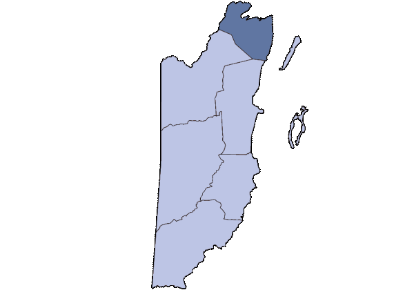 Corozal District in Belize